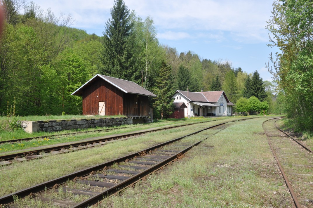 Bahnhof Skalsko, Bahnstrecke Skalsko–Stará Paka